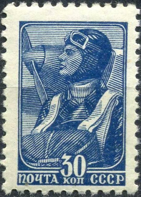 Почтовая марка СССР №695 ЦФА, Летчик/Парашютист (см. Каталог почтовых марок 1857—1960. Часть 1. Россия, РСФСР, СССР / Под общ. ред. В. Б. Загорского. — СПб.: Стандарт-Коллекция, 2002. — С. 61. — 200 с. — 2000 экз. — ISBN 5-902275-03-2) (Шестой стандартный выпуск)